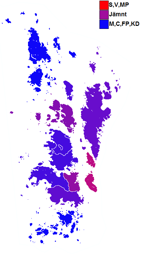 Öckerö kommunalval 2014 Rödgrönt: S, V, MP Borgerligt: M, C, FP, KD